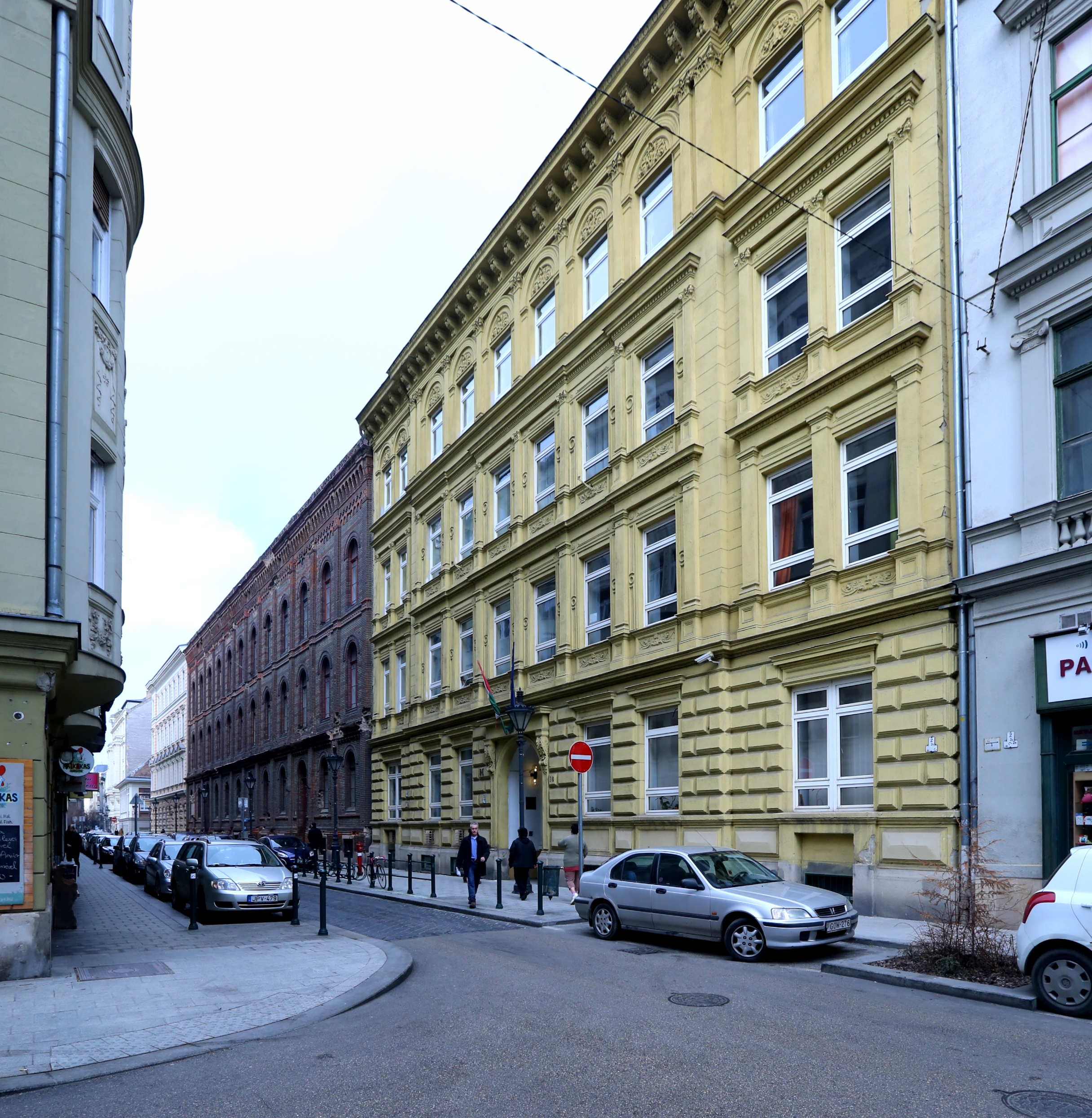 A gimnázium épülete. Veres Pálné utca 38.